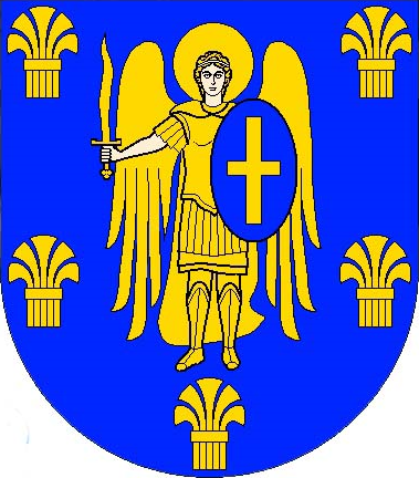 Герб Миронівського району (Київська область)